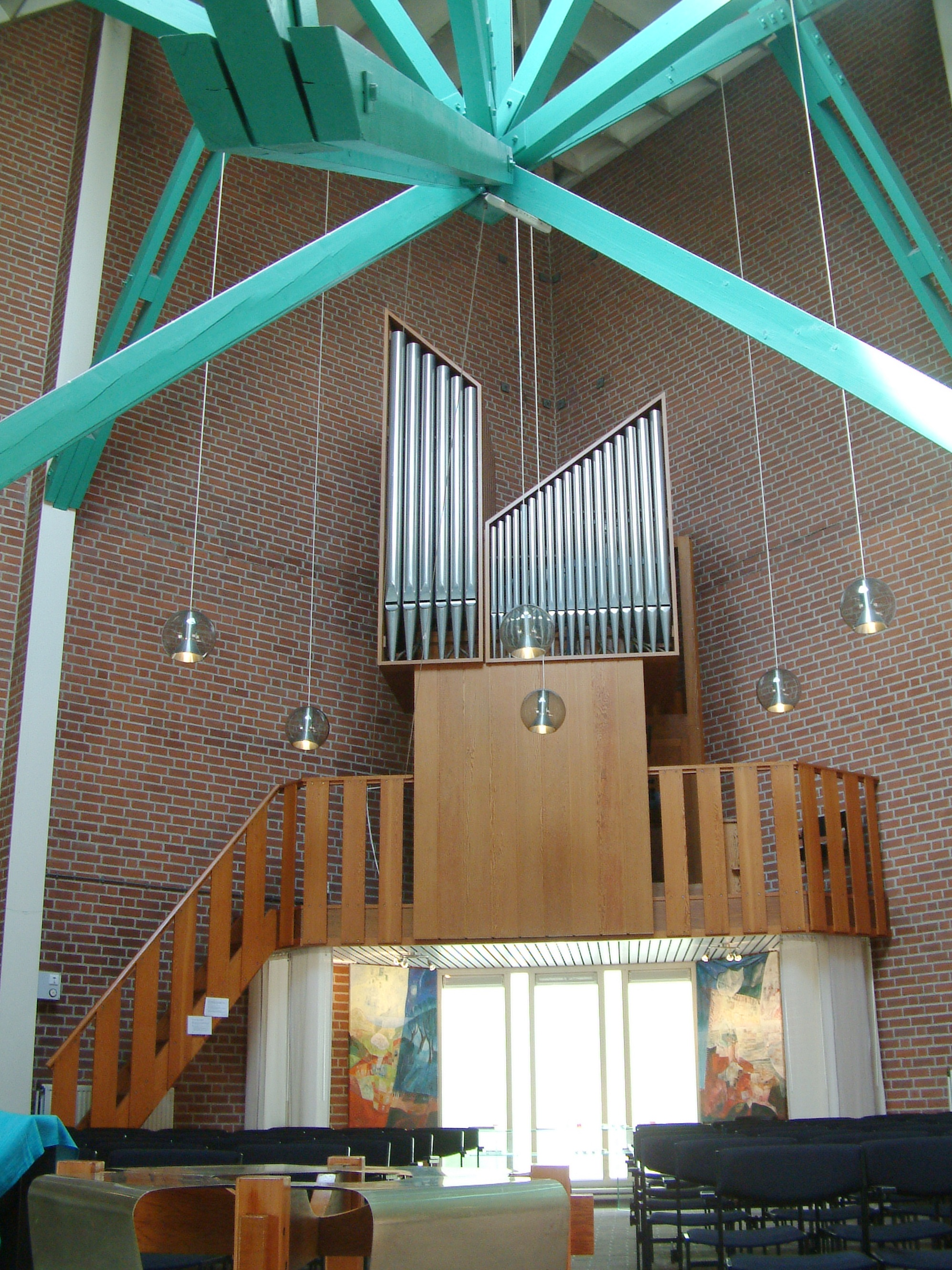 Protestantse kerk De Olijftak in De Leijens, Zoetermeer